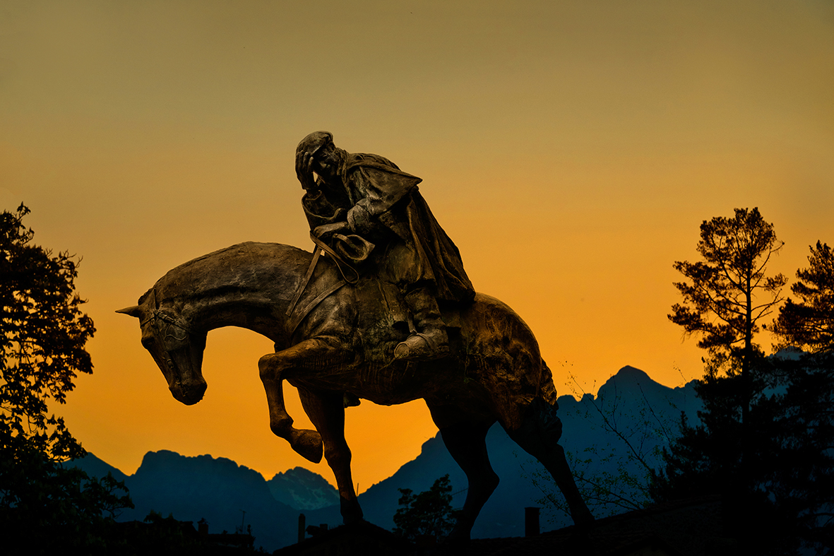 Obra del médico y escultor D.Ramón Ruiz Lloreda que representa magníficamente los esfuerzos de un médico rural arrostrando las inclemencias para atender a sus pacientes.